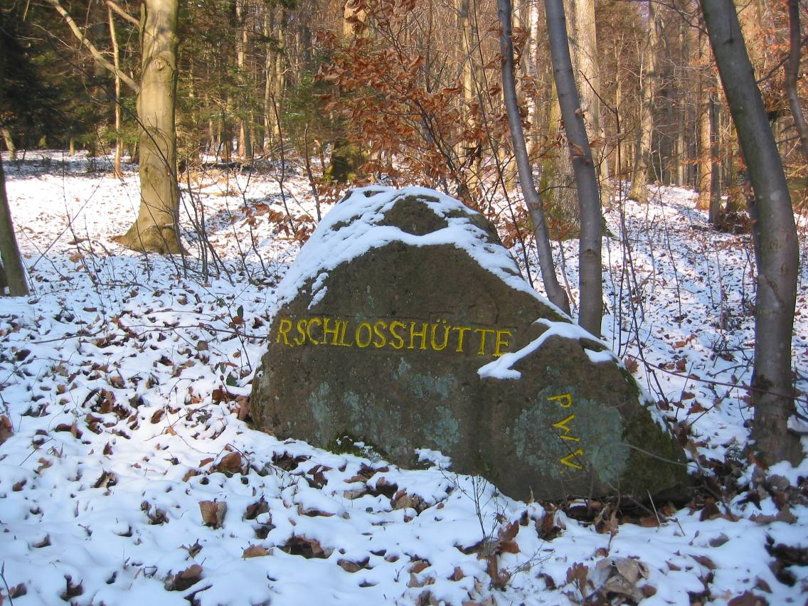 Ritterstein Nummer 15, R. Schloßhütte